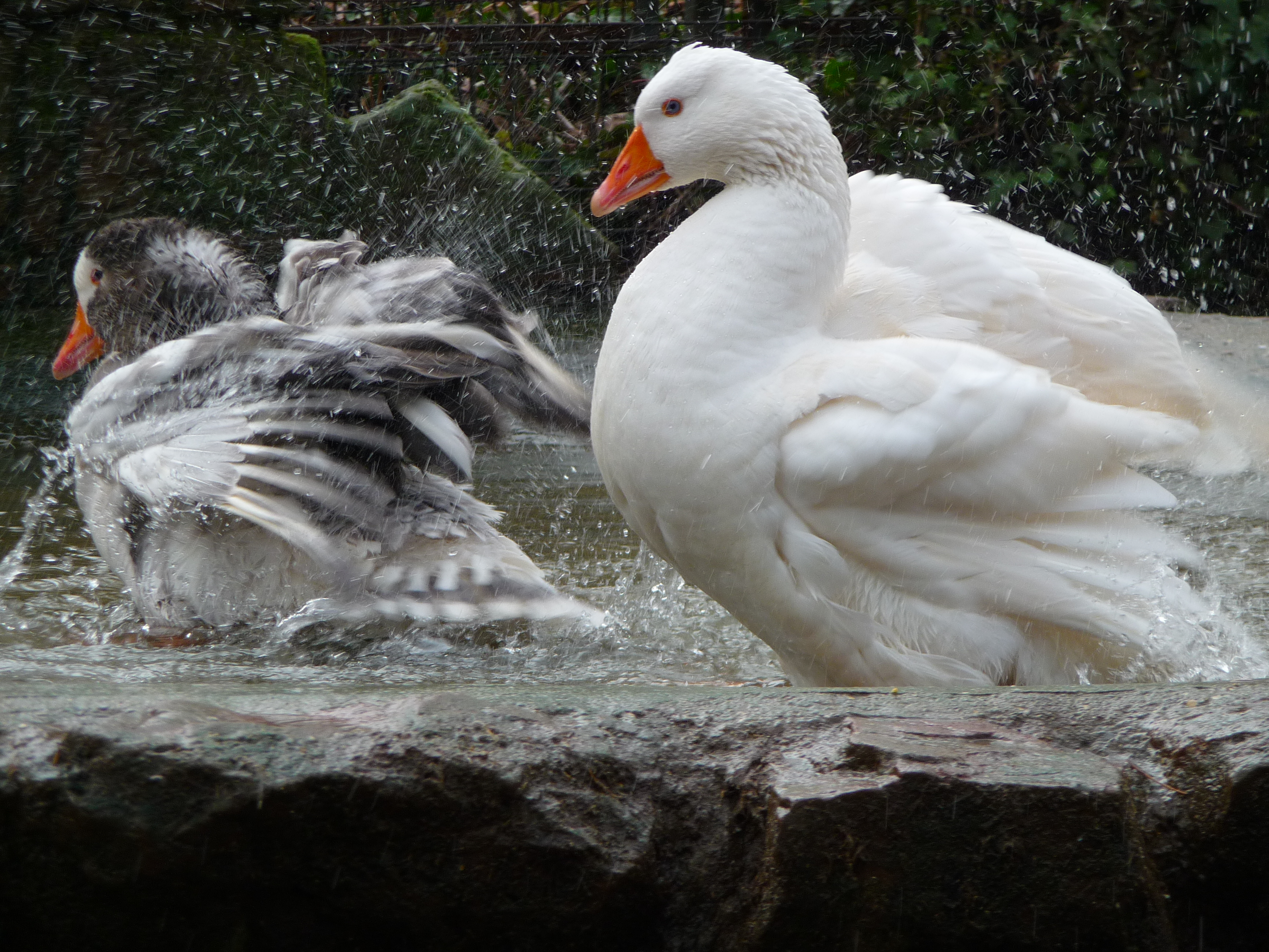 Badendes Gänsepaar (Hausgänse)